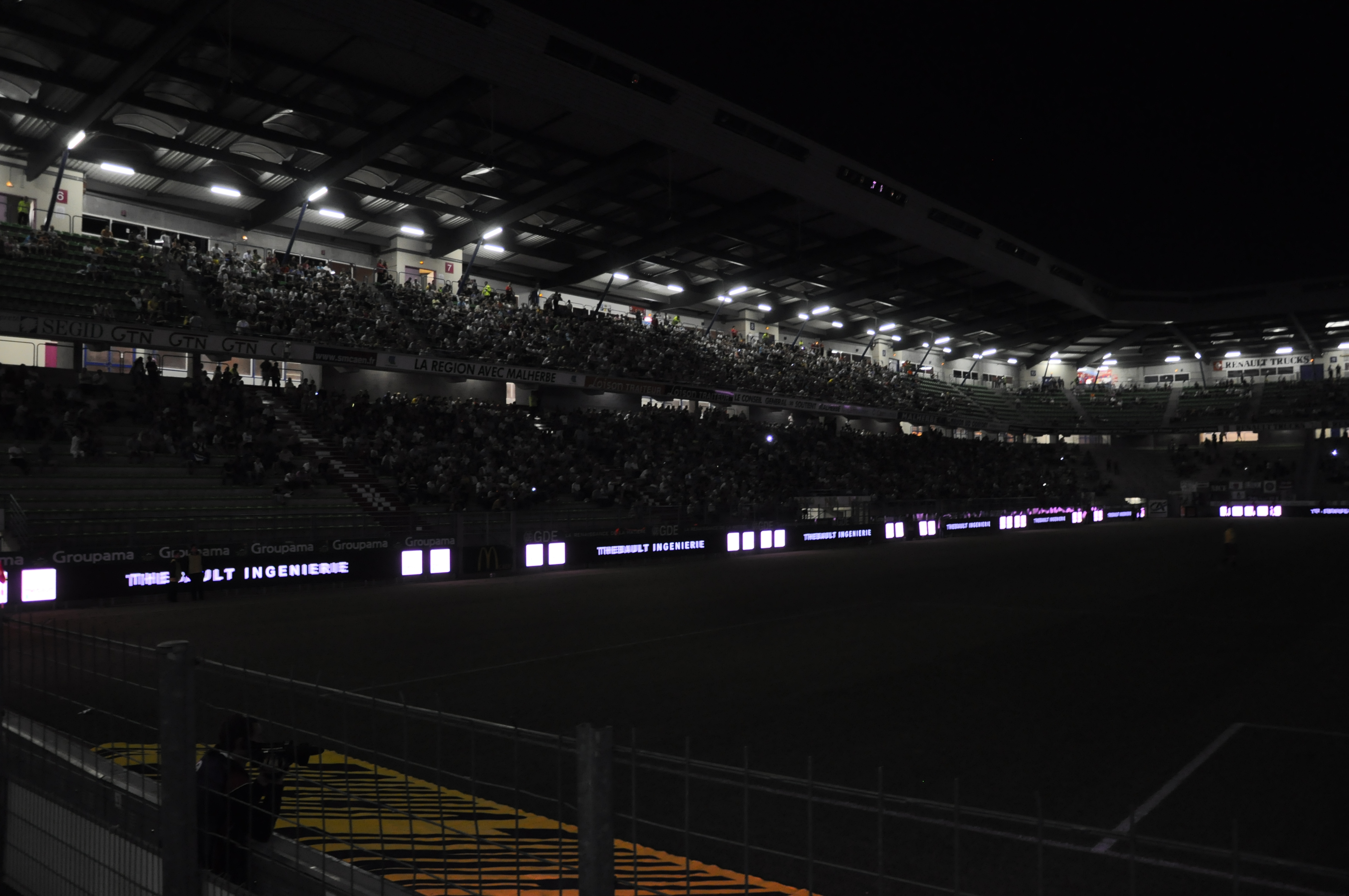 Le stade Michel d'Ornano plongé dans le noir lors du match Caen - Nice du 1 octobre 2011